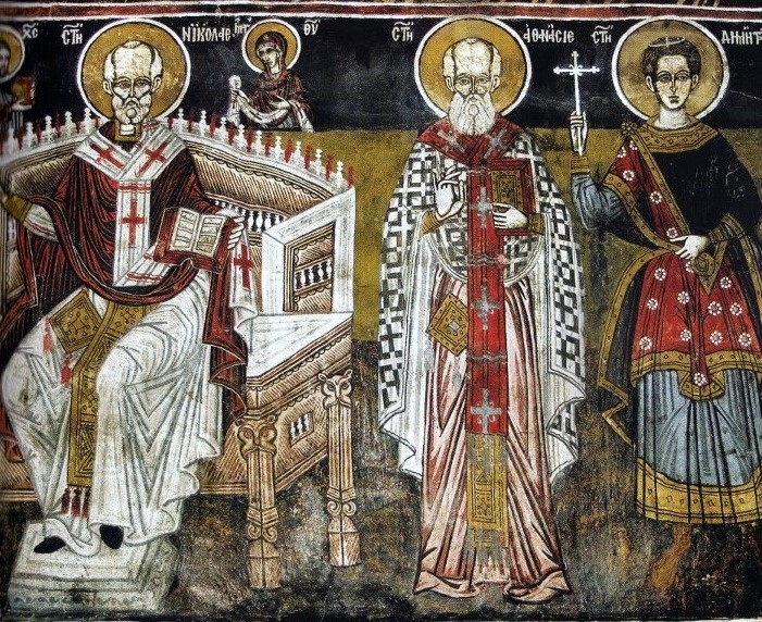 Фреска во манастирската црква Св. Никола во прилепско Слепче